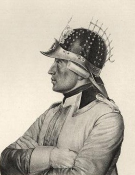 Кавалергардские Каски, 1799.